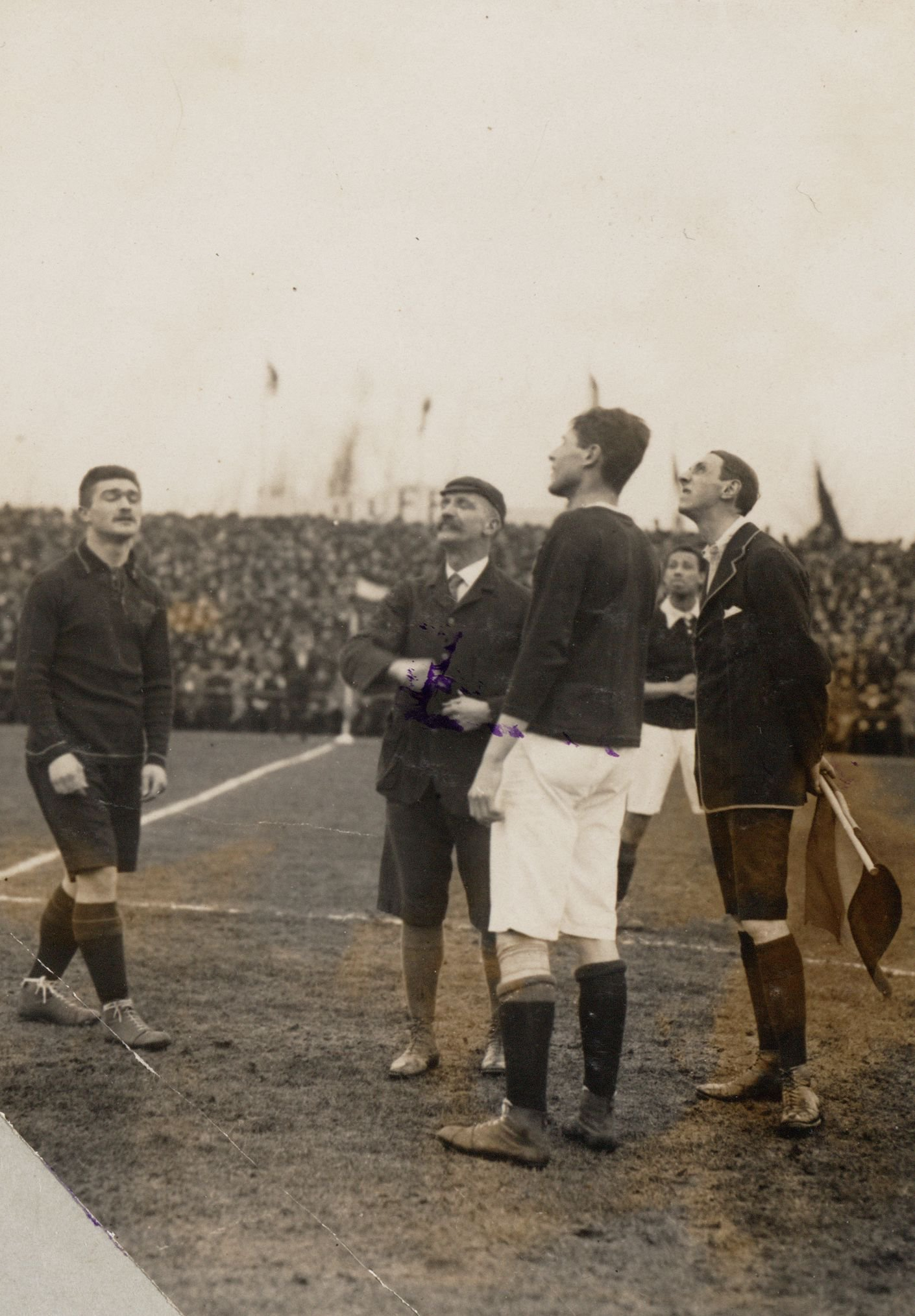 De Belgische aanvoerder Armand Swartenbroeks, de Engelse scheidsrechter Schumacher, aanvoerder Leo Bosschart, David Wijnveldt en de Nederlandse grensrechter Mutters bij de toss. België - Nederland (2-4), gespeeld op 15 maart 1914 in het stadion van Beerschot (Het Kiel) te Antwerpen.